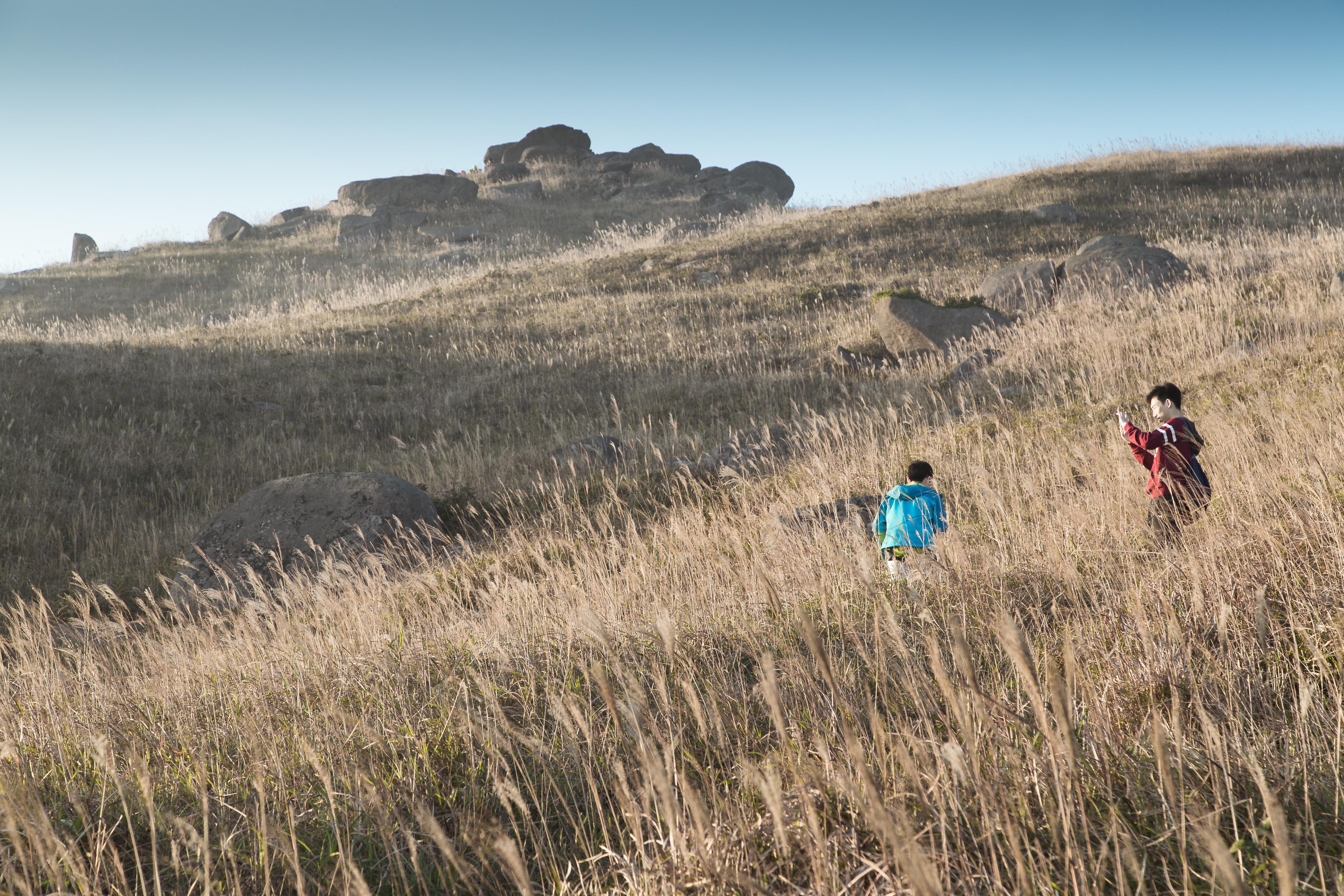 Sunset Hill, Hong Kong